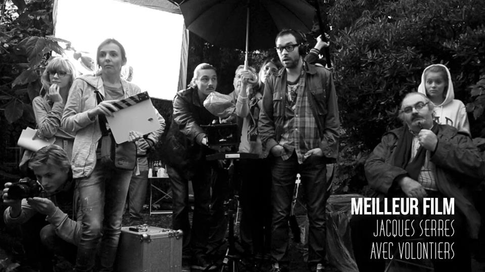 image du film gagnant du 48H film project edition Paris 2012 "le dernier film de Jacques Serres"